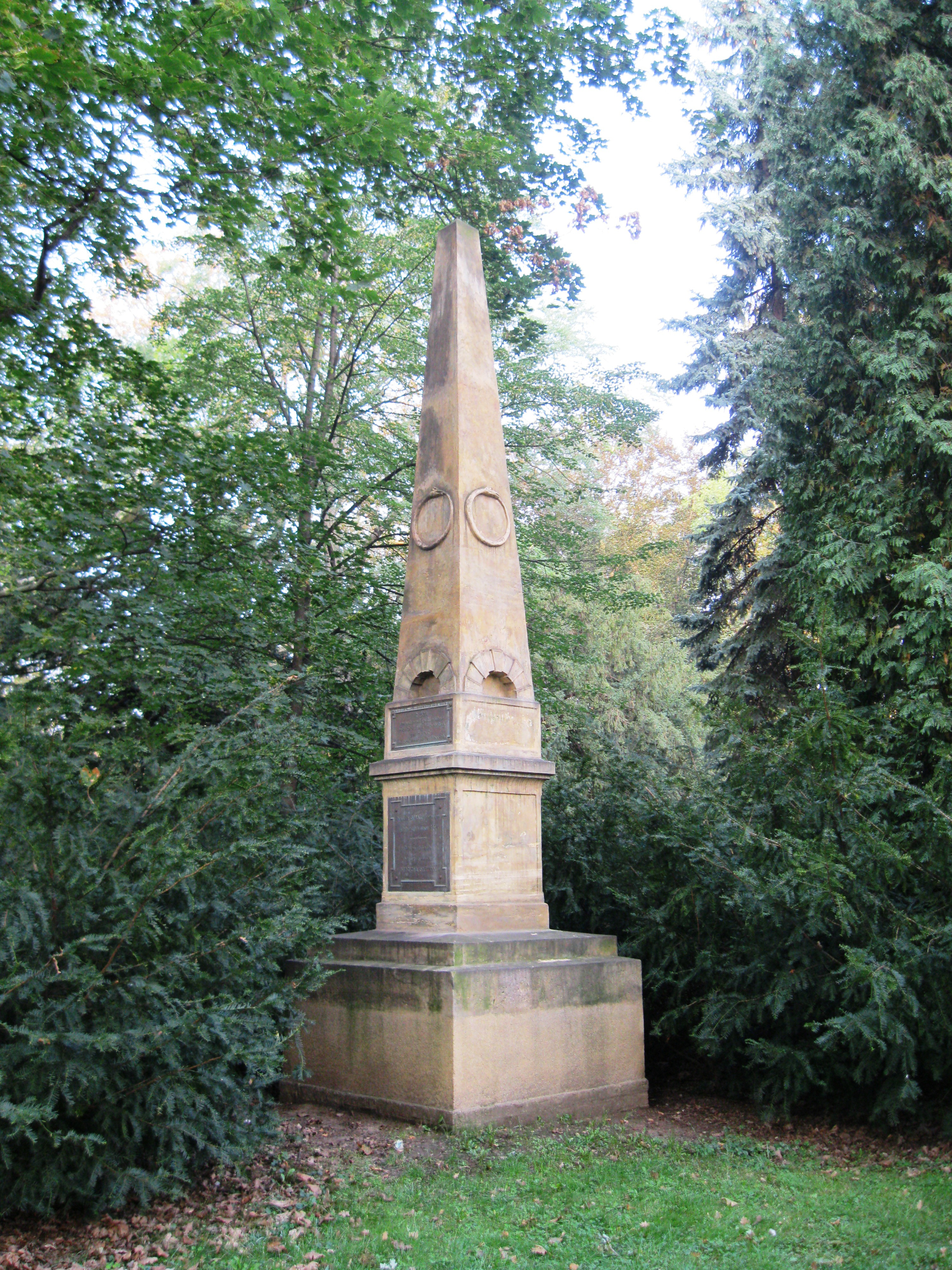 Obelisk (Prostějov), Smetanovy sady, východní část, Prostějov